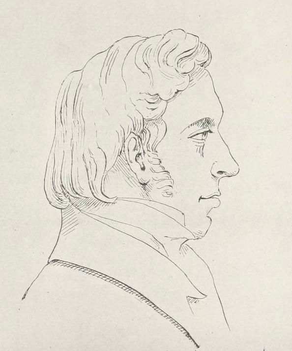 M.R. Penchaud